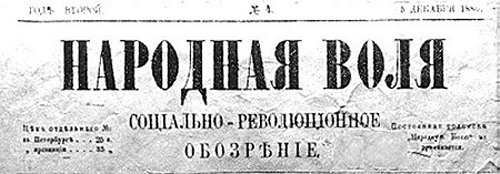 Narodnaja Volja (giornale), edizione n. 4 del 5 (17) dicembre 1880